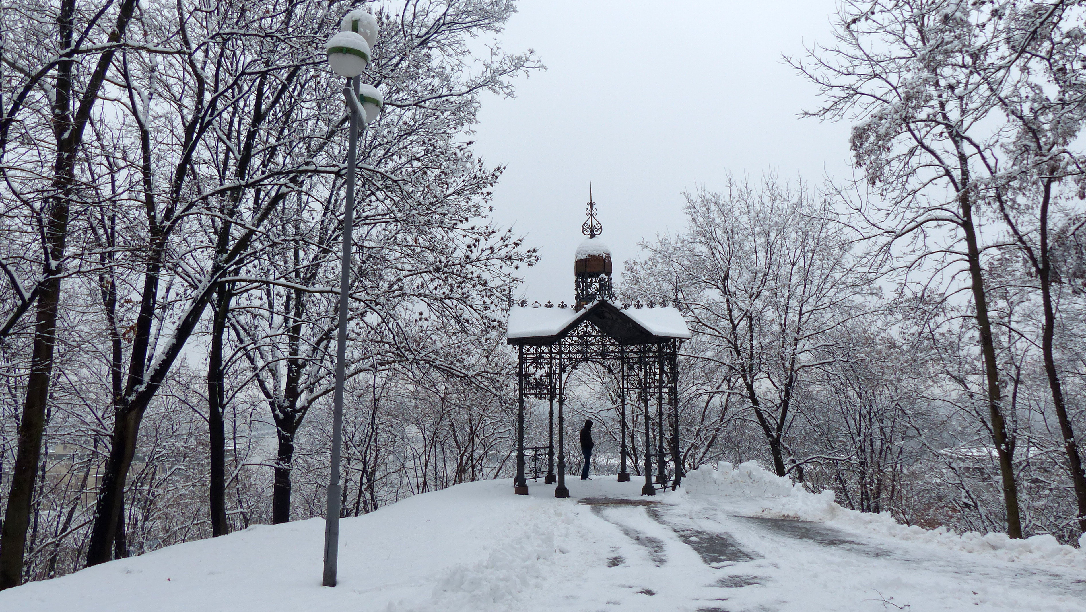 Володимирська гірка, Шевченківський район